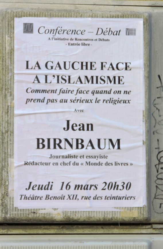 Théâtre Benoît-XII, Avignon - conférence de Jean Birnbaum